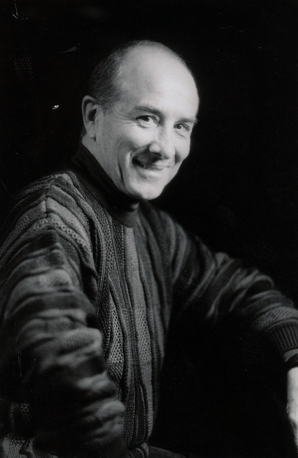 Gustavo Mollajoli (Foto para difusión entregada al Archivo Histórico Artístico del Teatro Argentino de La Plata)